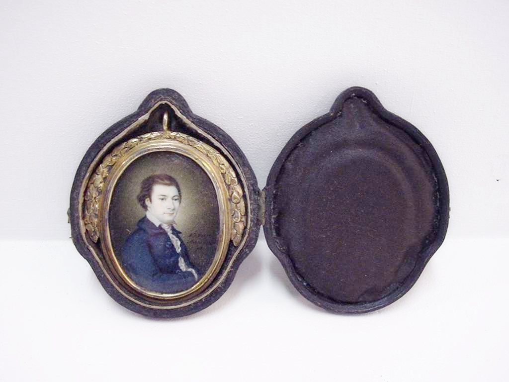 Uit bezit van J. Bellamy. Een gravure naar het miniatuurportret is gebruikt voor de titelgravure van de uitgave 'Gedichten'. Mr. A.J. van Mansvelt was een vriend van Bellamy en amateur-schilder. De dichter was er heel tevreden over: een meesterstuk noemde hij het, en volgens zijn verloofde Francina Baane die het cadeau kreeg, was het 't best gelijkend portret van haar vriend.